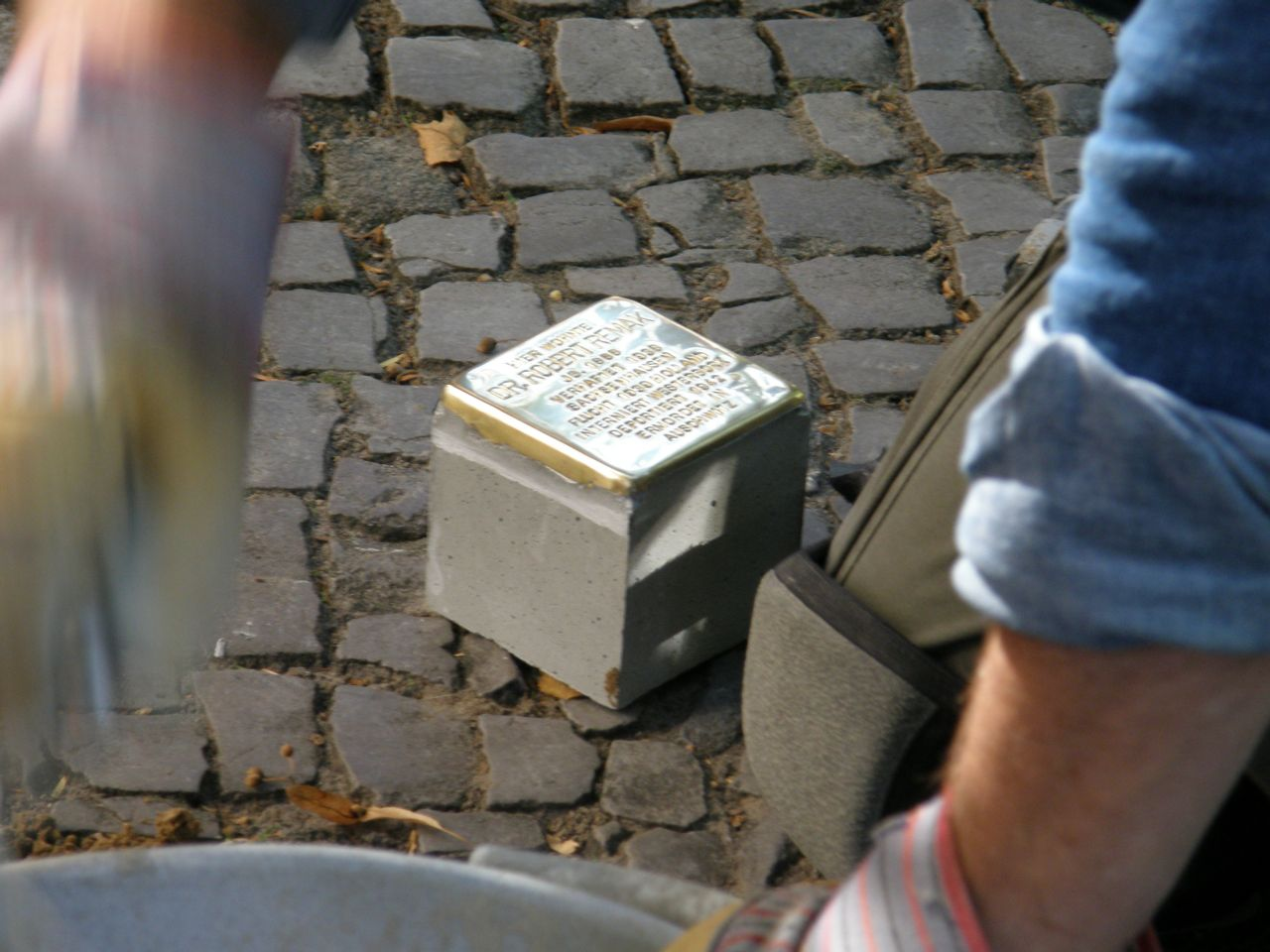 Stolperstein für Dr. Robert Remak, Manteuffelstraße 22a, Berlin-Lichterfelde